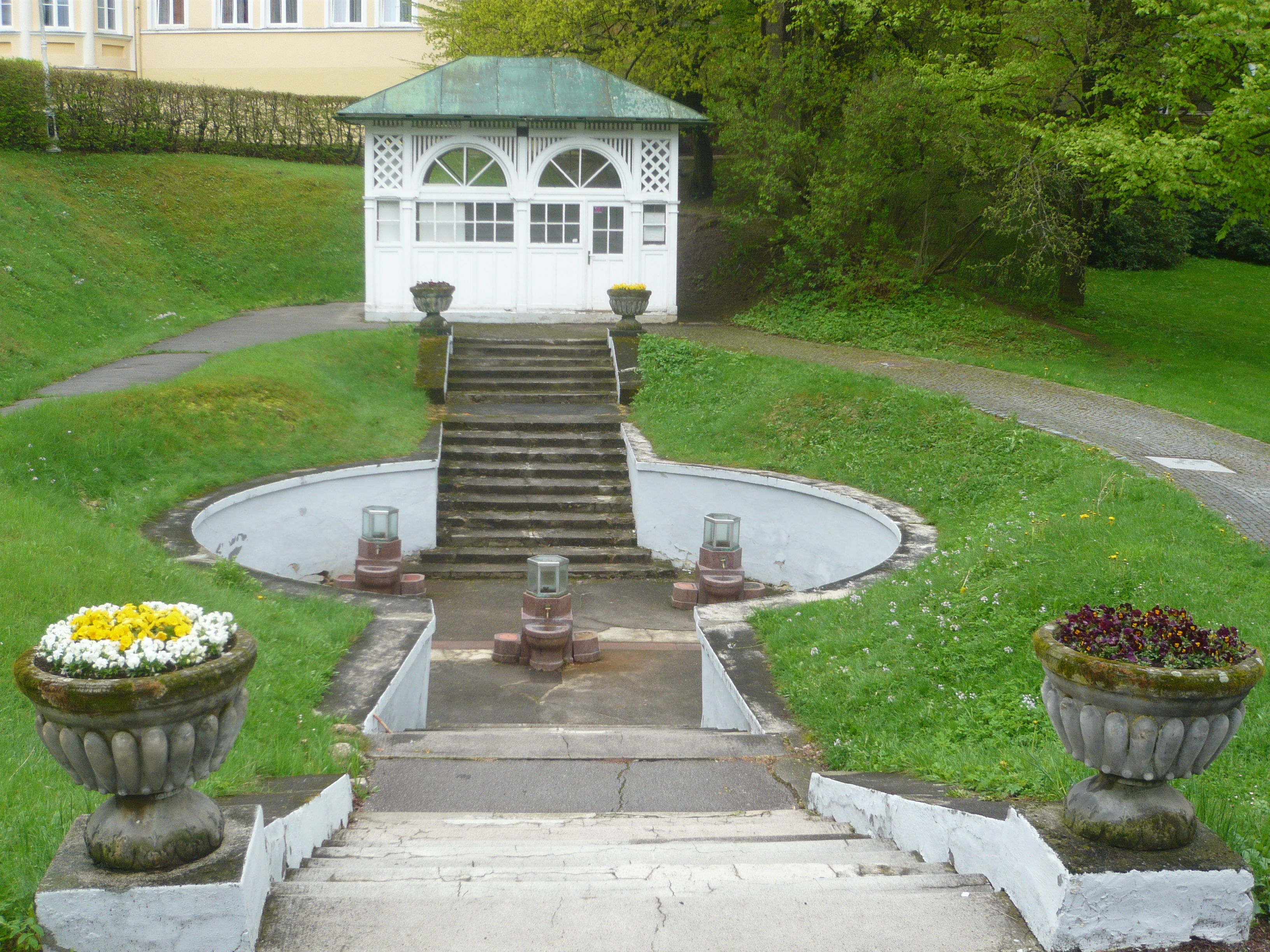 Ambrožovy prameny, Mariánské Lázně